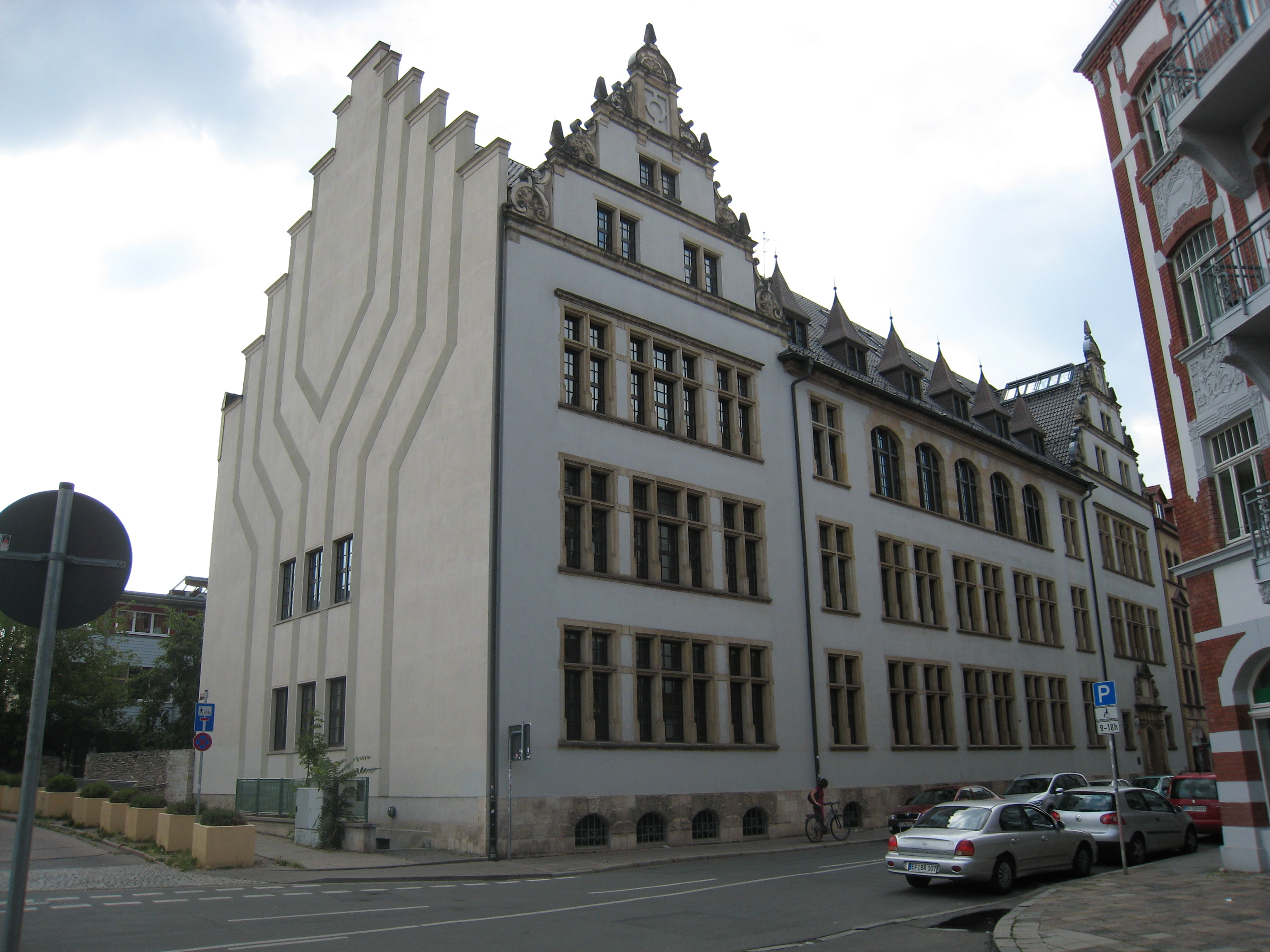 Edith-Stein-Schule Erfurt 1